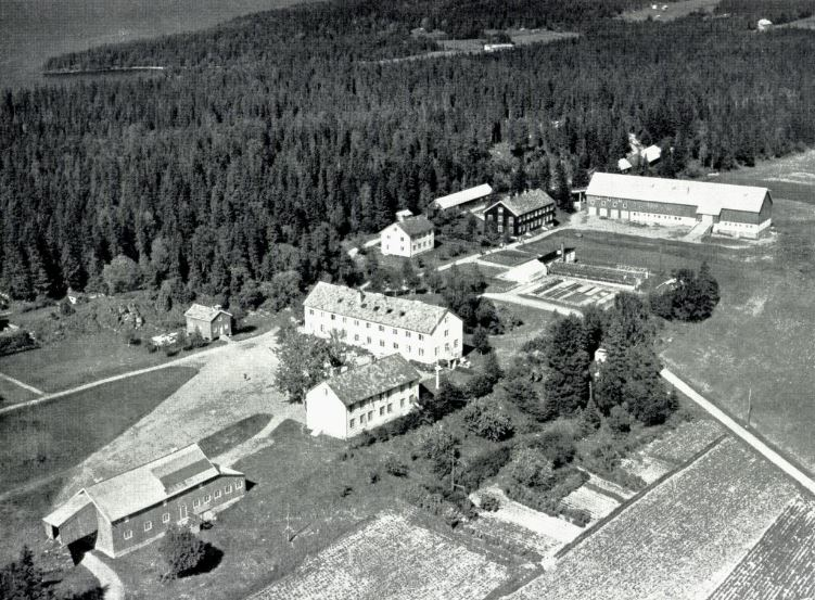 Finsås småbruksskole (jord- og skogbruksskole) på Jørstad på Snåsa.